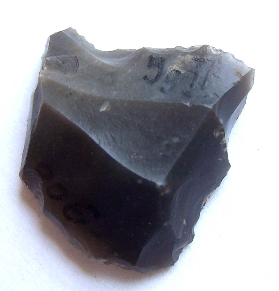 Skałka muszkietu z XVII wieku. The flint for flintlock. 17th century. Own work 10-05-2005